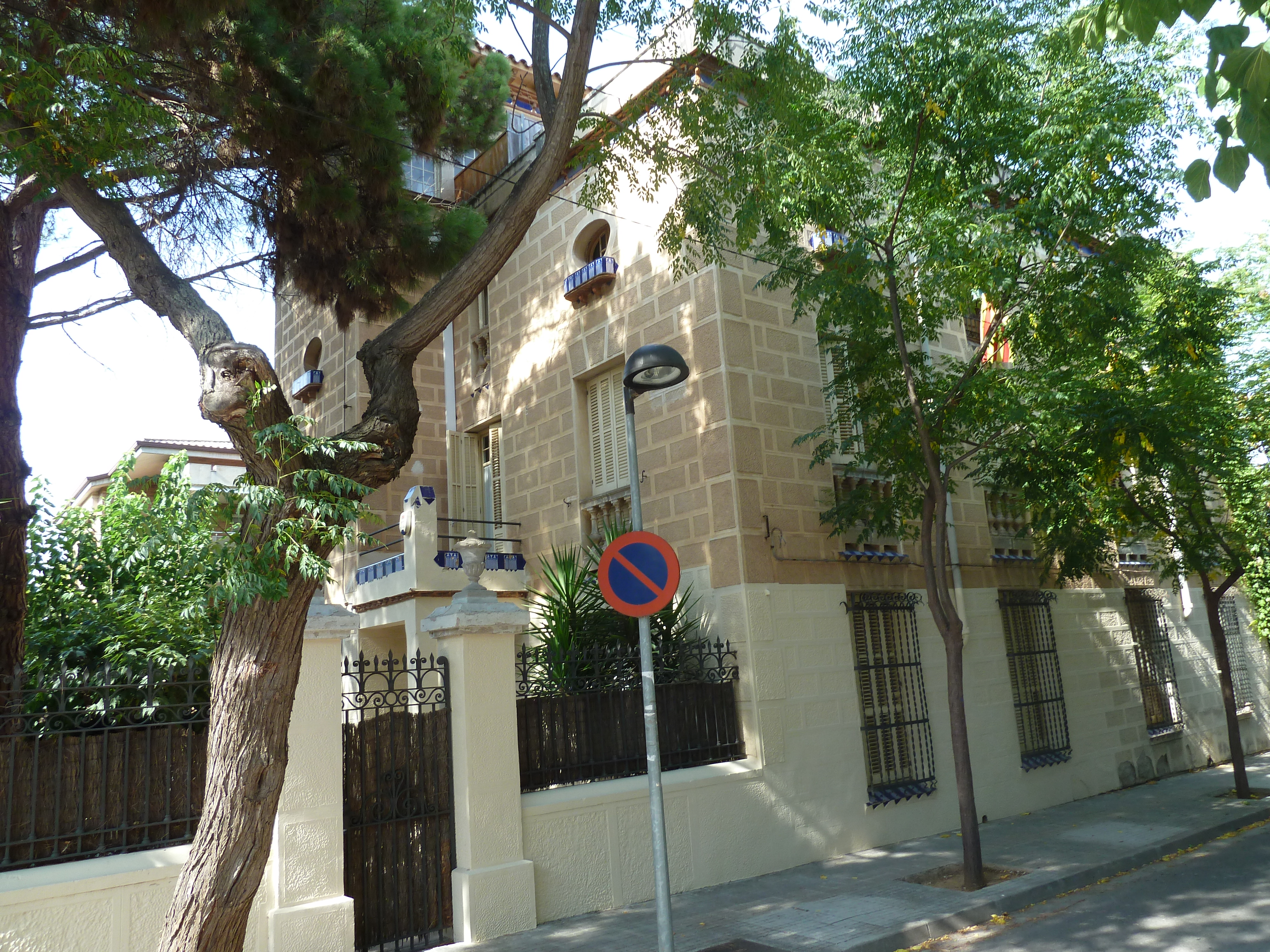 Sant Cugat del Vallès